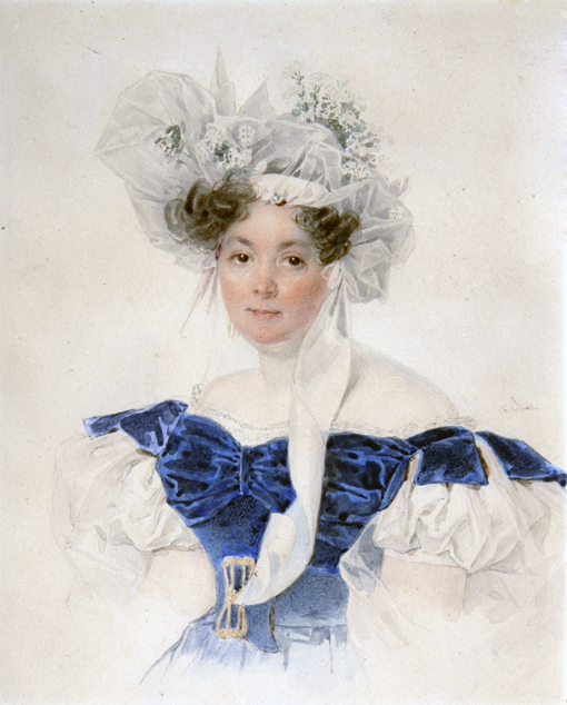 Княгиня Варвара Сергеевна Голицына,урожд. Румянцева-Кагульская (1794–1875), незаконная дочь Сергея Петровича Румянцева (1755-1838) и Анастасии Николаевны Нелединской-Мелецкой, ур. кн. Головиной (1764-1803); с 1812 года жена князя Павла Алексеевича Голицына(1782-1848).